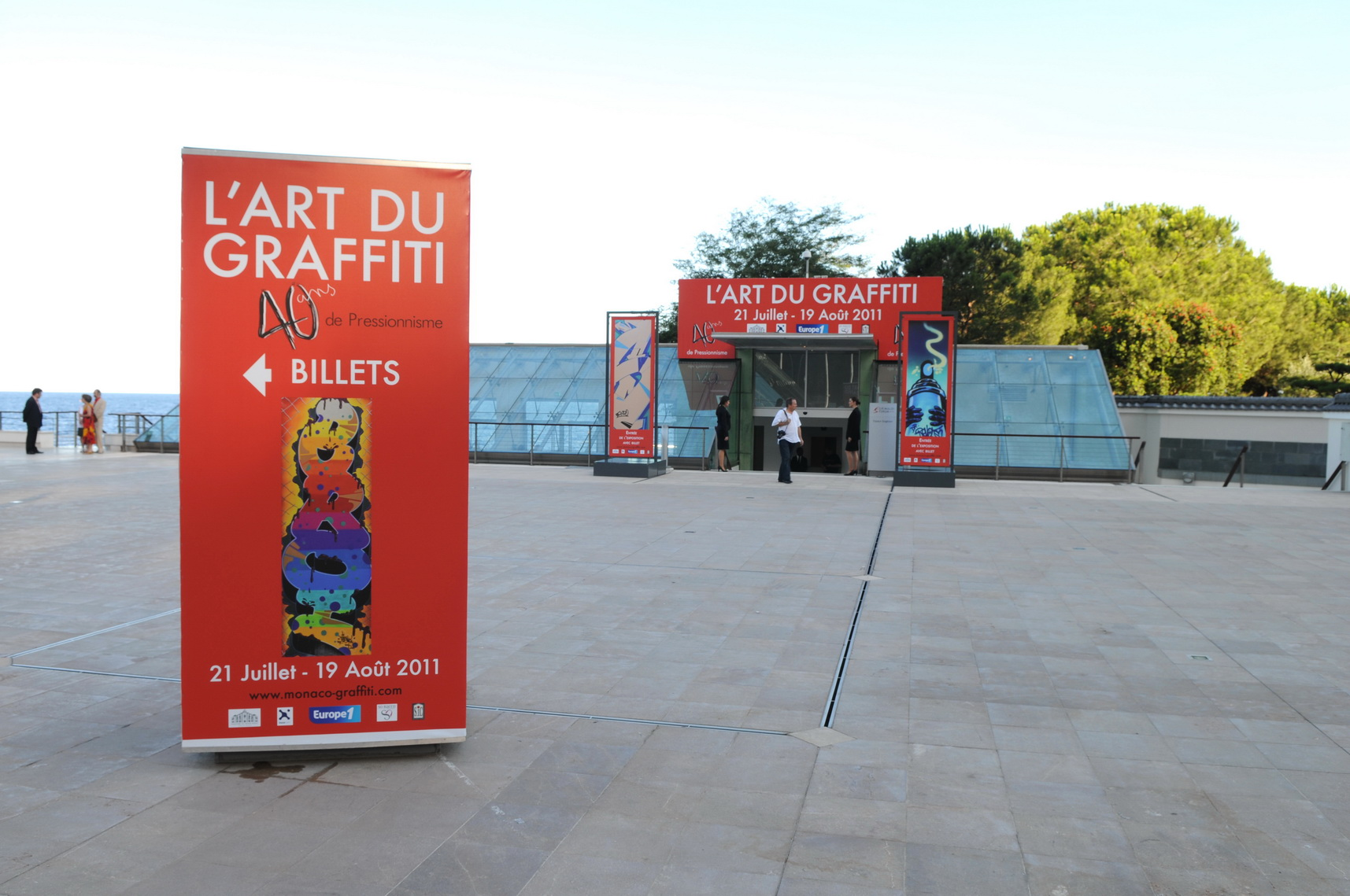 Photographie de l'entrée de l'exposition : L'Art du Graffiti : 40 ans de Pressionnisme Juillet-Août 2011, Grimaldi Forum Monaco